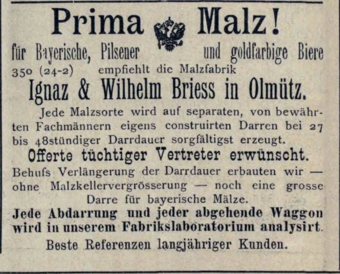 Annonce des k.k. Hoflieferanten Ignaz & Wilhelm Briess, Olmütz. In: Der Böhmische Bierbrauer, 15. Mai 1893, Nr. 10, S. 248.